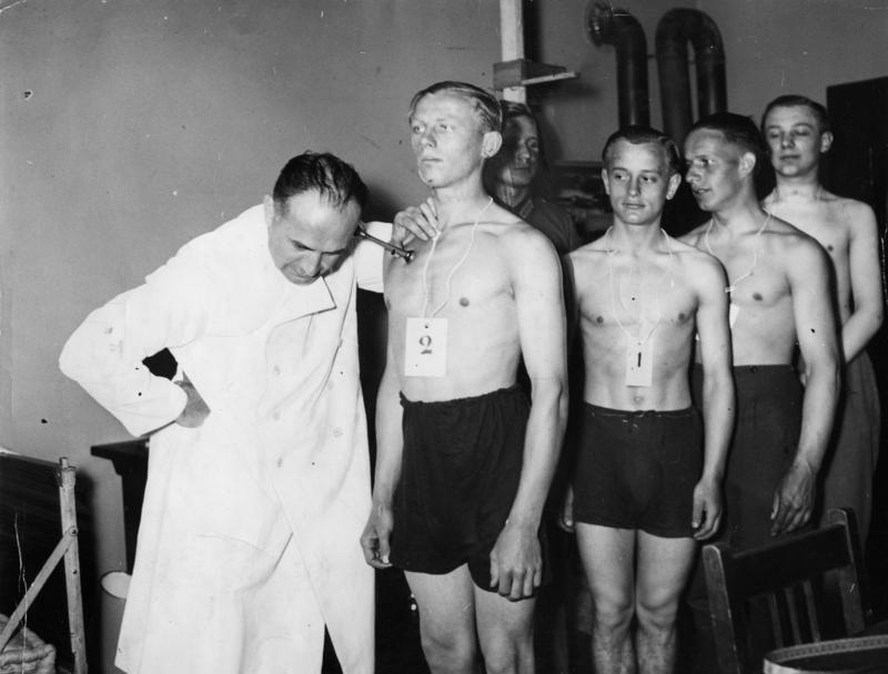 Potsdam, Musterung für die Wehrmacht Zentralbild Wehrbezirkskommando VI in der Potsdamer Privatstr. 121 Musterung zur Dienstpflicht in der deutschen Wehrmacht. (Aufnahme Juni 1935) 20543-35 [Scherl Bilderdienst]